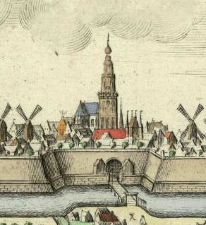 De Akerk met de toren met houten spits die na 1672 werd gebouwd en in 1710 instortte. Op de voorgrond de Apoort. Uitsnede uit het cartouche van de stad Groningen onderaan de Coenderskaart.